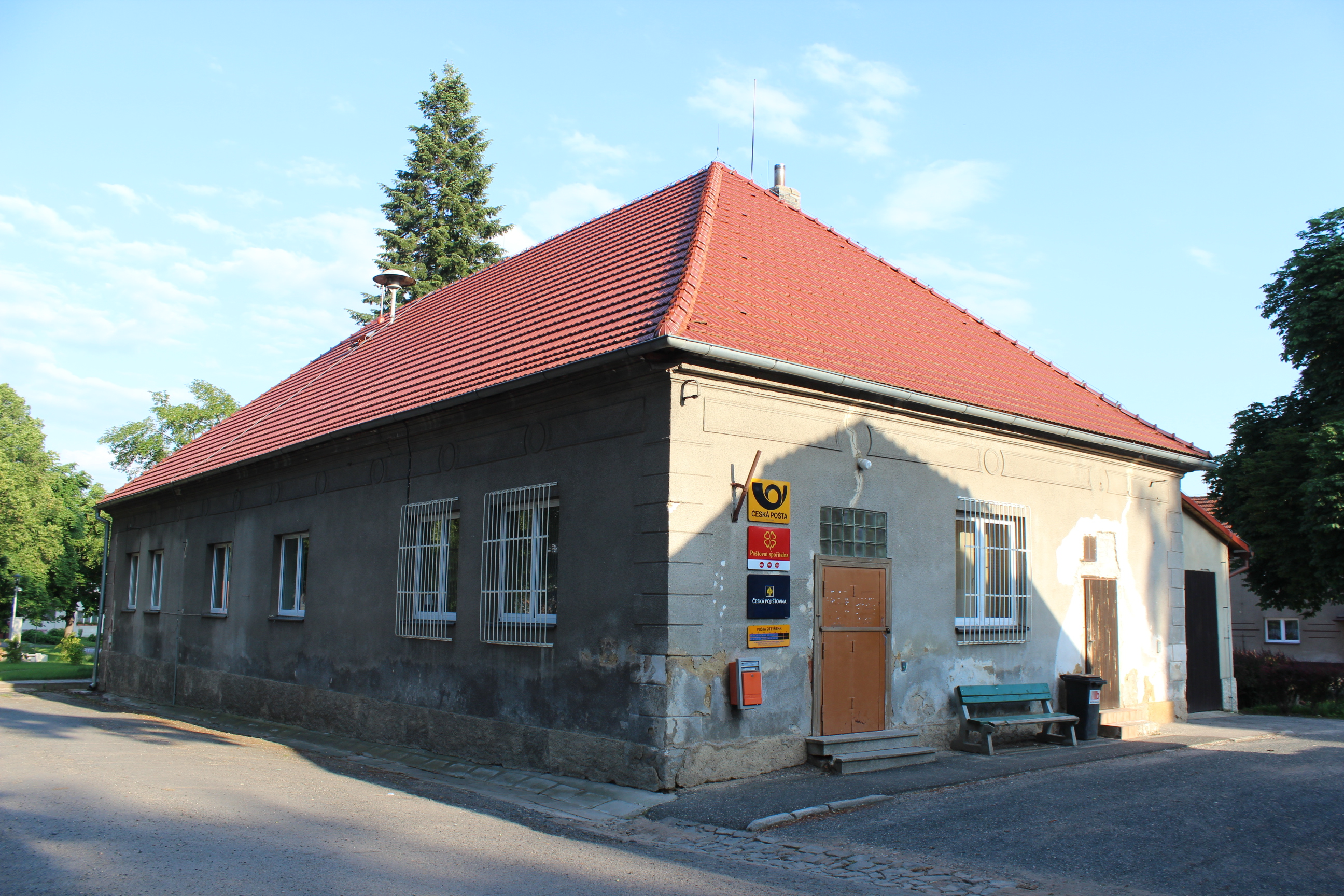 Obecní a poštovní úřad (dům číslo popisné 89) v Lužné v okrese Rakovník.